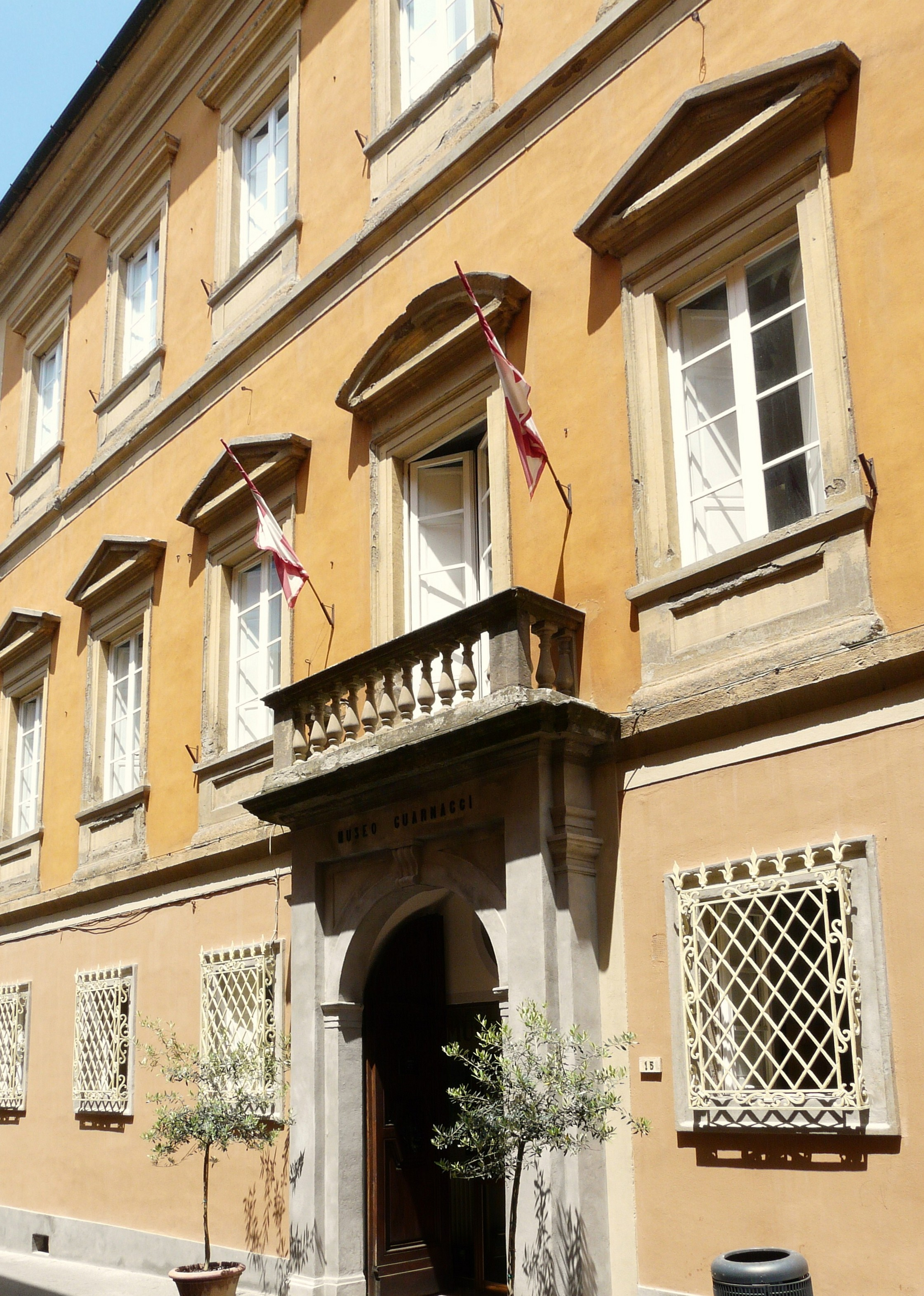 Museo Etrusco Guarnacci, Volterra, Toscana, Italia